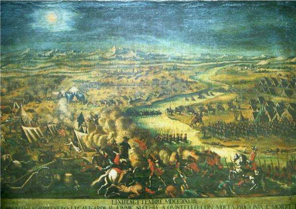 Dipinto raffigurante la battaglia di Quistello del 14 settembre 1734, che vide scontrarsi sulle rive del fiume Secchia l'esercito dei 58.000 Gallo-Sardi comandati da Carlo Emanuele III contro le forze austriche del conte di Konigseck. Lo scontro si concluse con 3.500 prigionieri, 500 morti e una gran numero di feriti.